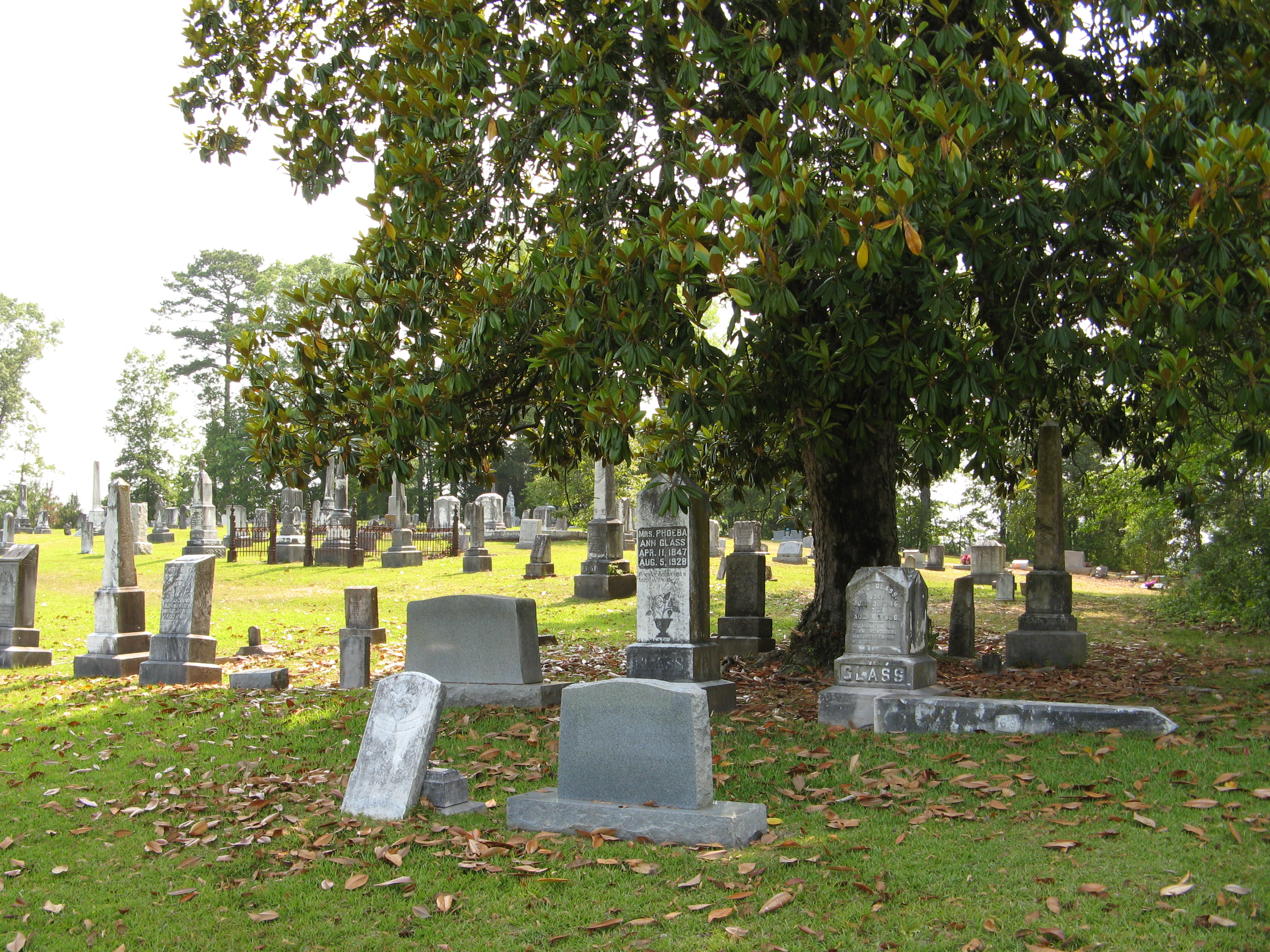 Sallis (Attala County), Mississippi.